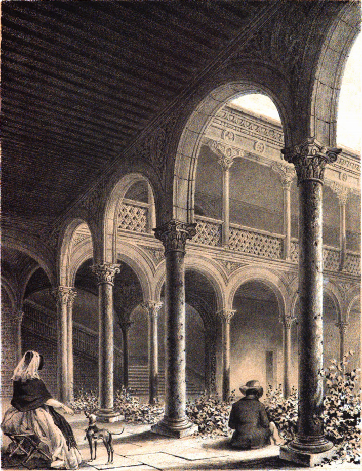 Antiguo patio de Fonseca (actualmente desaparecido) del Palacio arzobispal de Alcalá de Henares. Lámina dibujada del natural y litografiada por Francisco Javier Parcerisa en 1853, para la obra Recuerdos y bellezas de España: Castilla la Nueva.